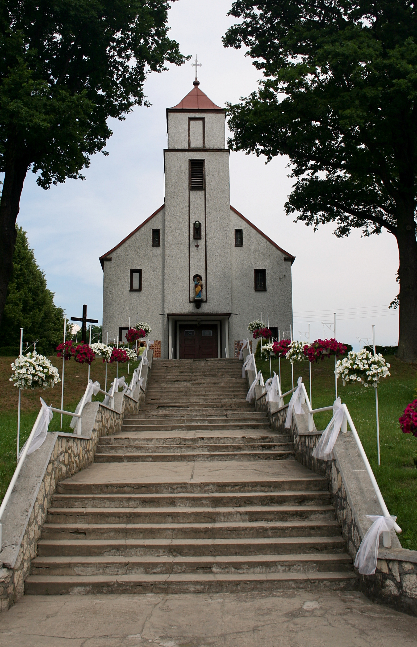 Kościół św. Wacława w Pniowie, gmina Toszek, woj. śląskie